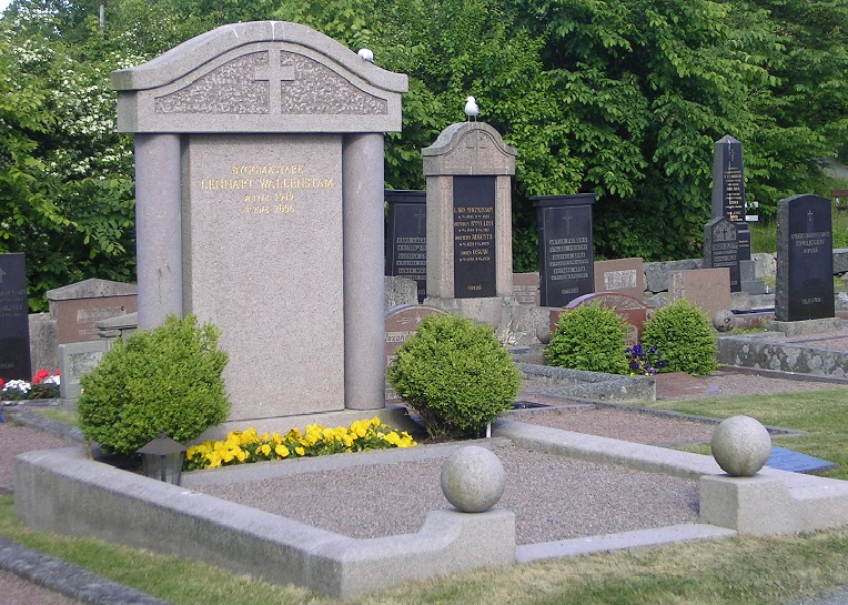 Byggmästare Lennart Wallenstams grav på Styrsö kyrkogård